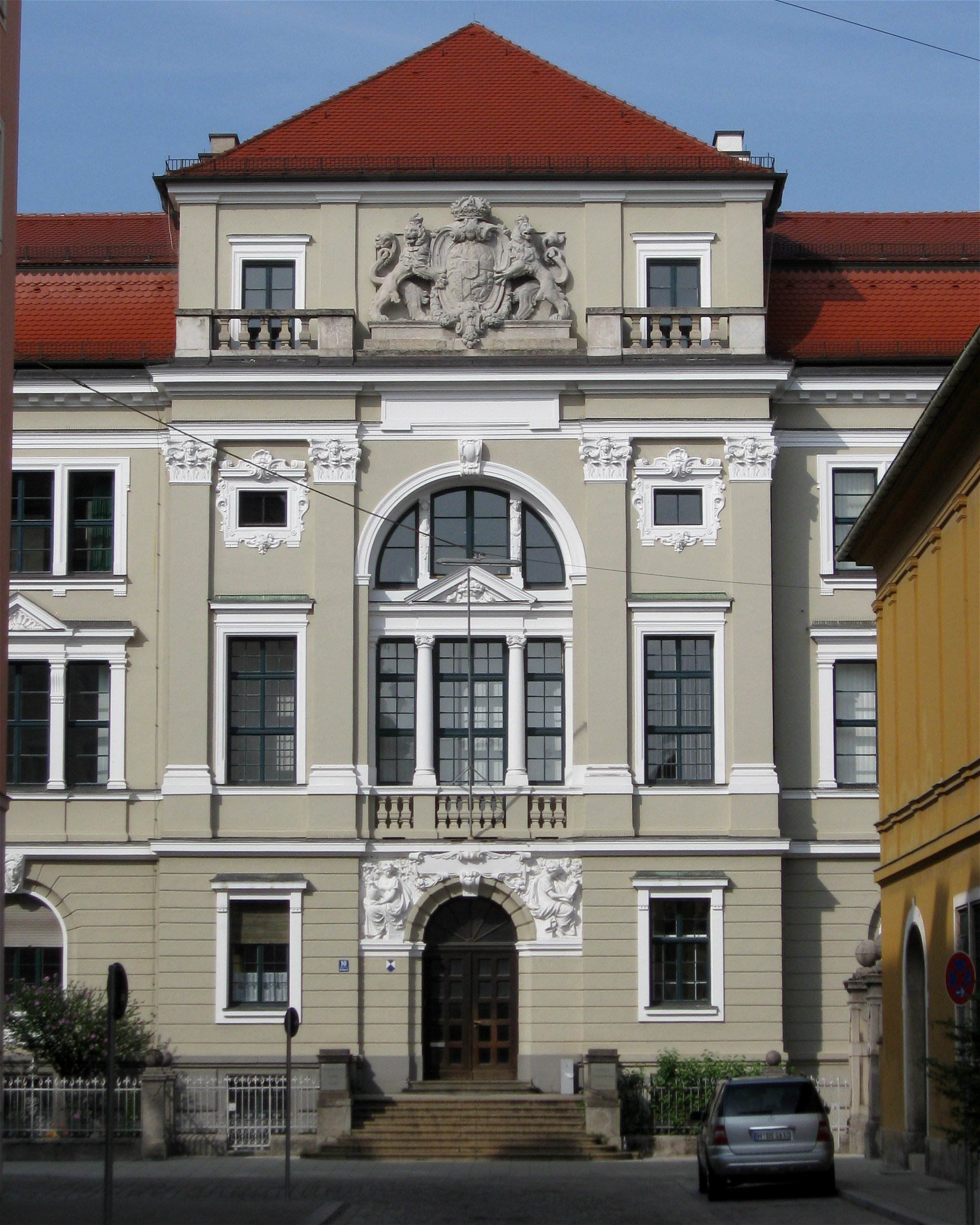 Richard-Wagner-Straße 10; Ehem. Teil der Kunstgewerbeschule, jetzt Institut der Ludwig-Maximilians-Universität und Paläontologisches Museum, repräsentativer Neubarockbau, mit von Arkaden umgebenem Lichthof, 1899-1902 von Leonhard Romeis; an der Südseite plastischer Schmuck, Freitreppe und Vorgarten mit Pfeilerzaun.